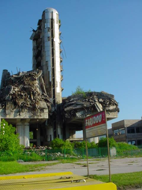 Destroyed Oslobodjenje building